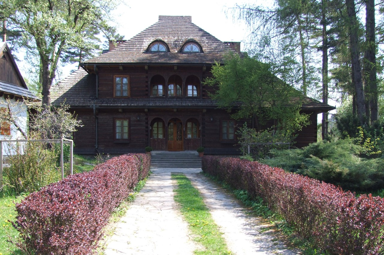 Budynek dawnej izby celnej w Niedzicy.